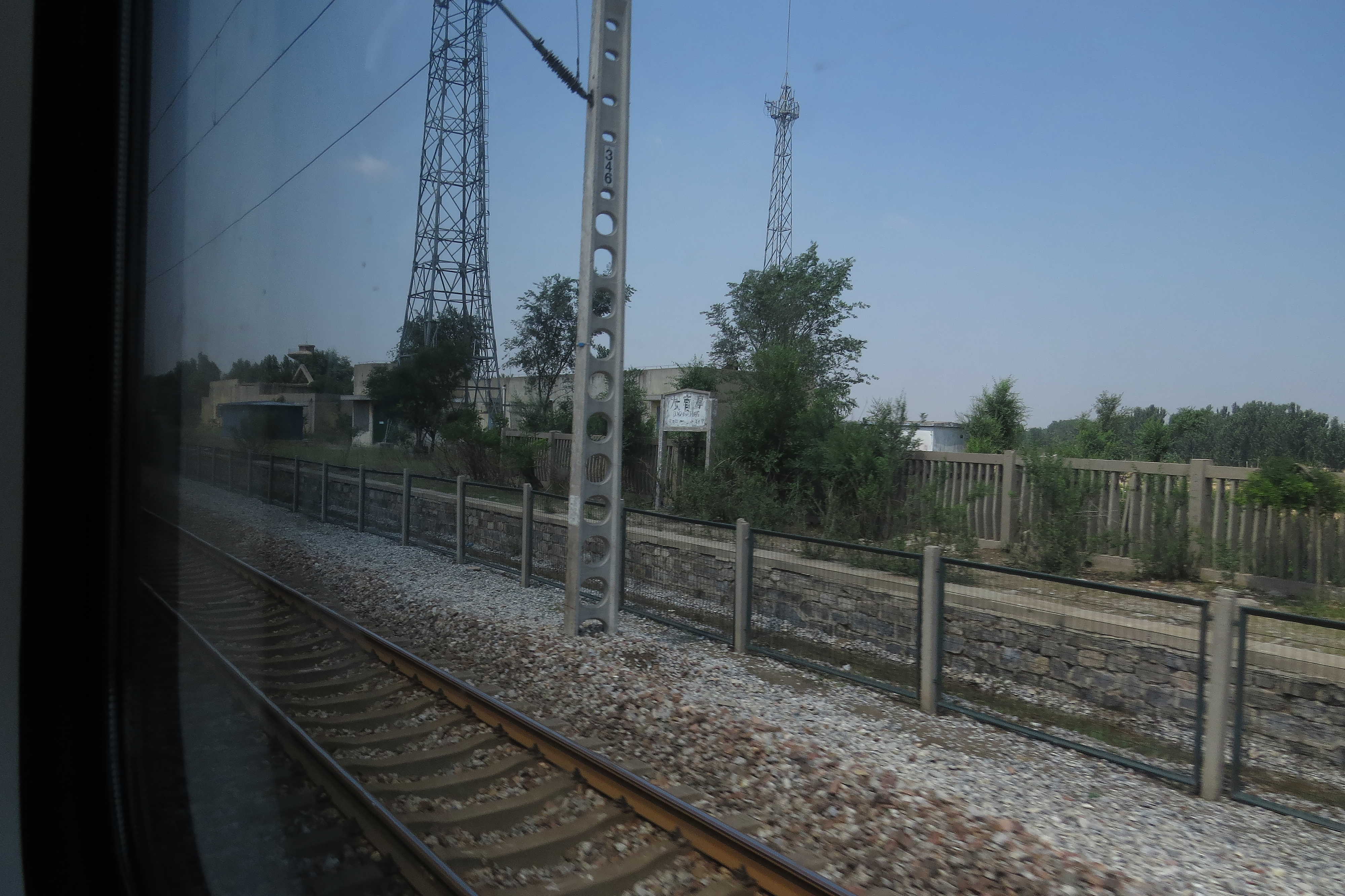 大官亭站遗址